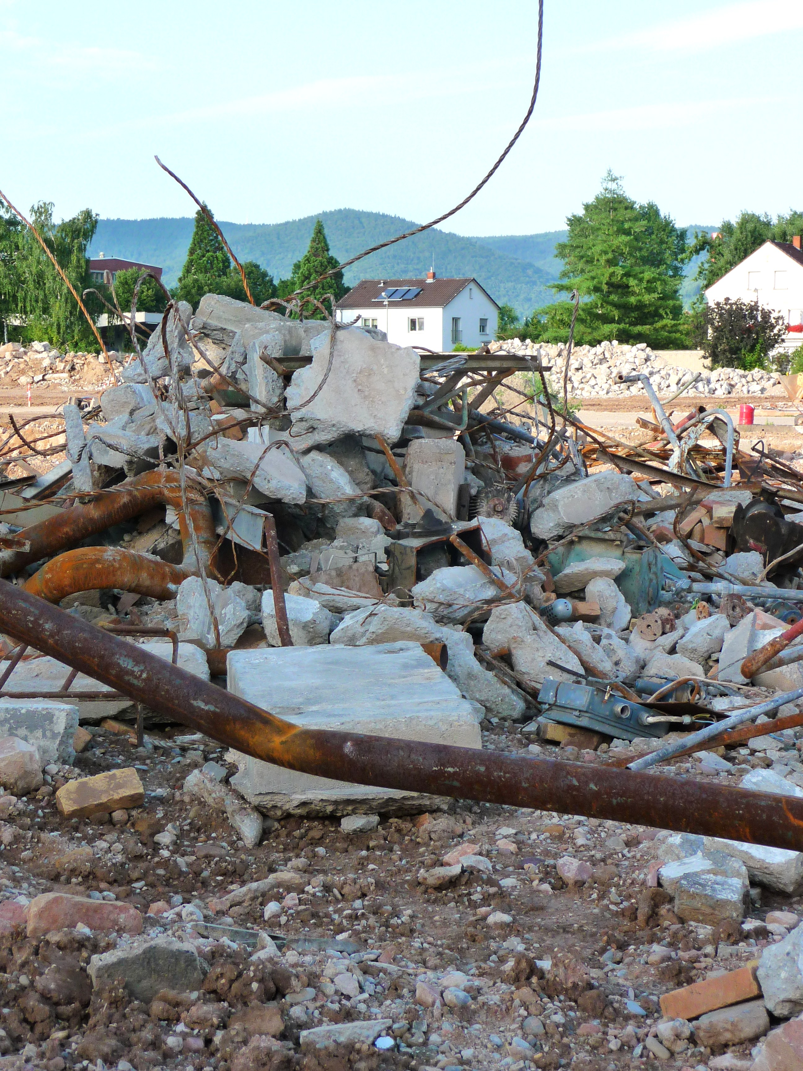 Bauschutt auf einem Grundstück im Heidelberger Stadtteil Pfaffengrund (Baden-Württemberg, Deutschland)